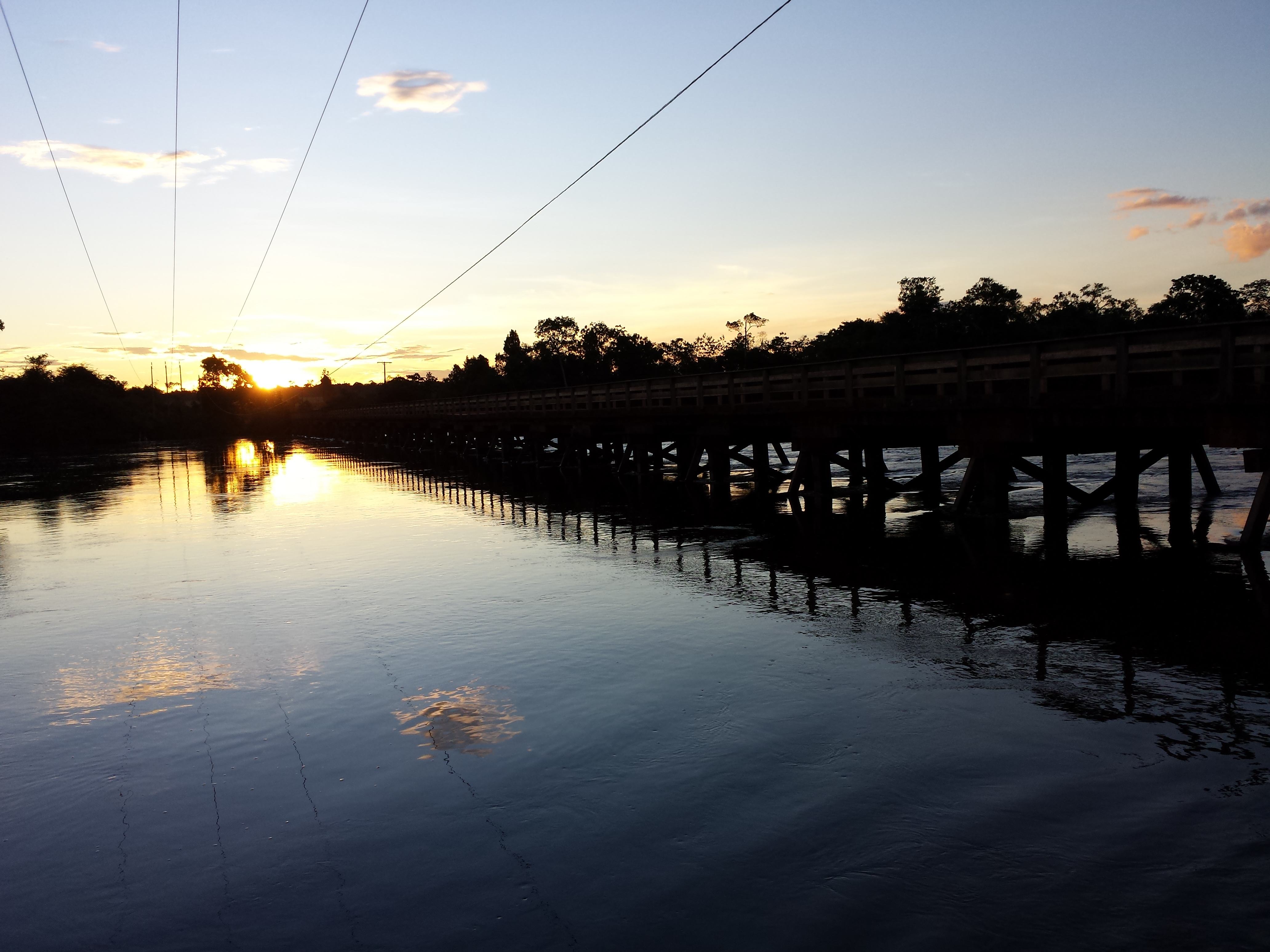 Pôr do sol no Rio Aripuanã